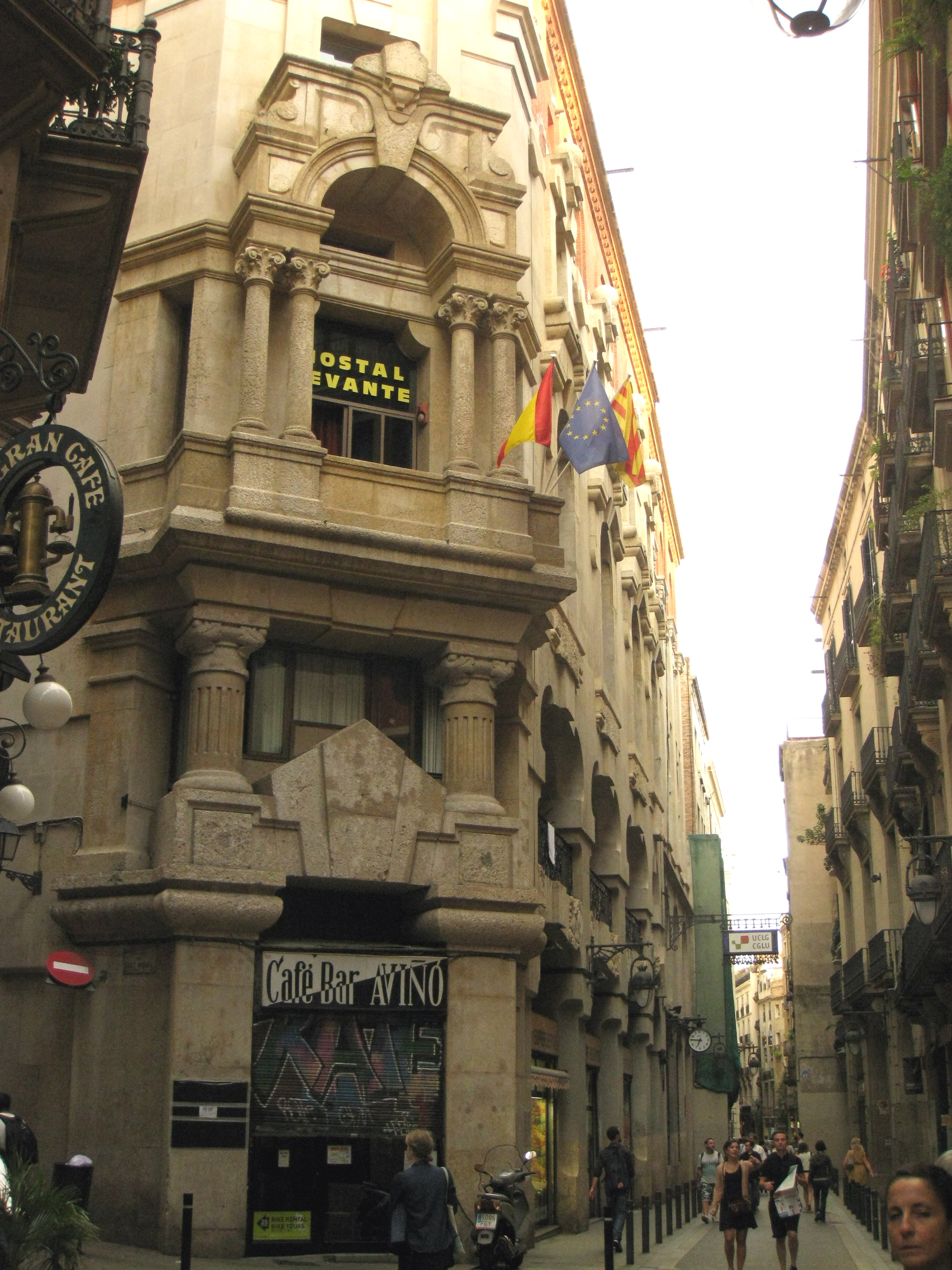 Antiga central telefònica, de Pere Falqués i Urpí (1902), al carrer d'Avinyó núm. 11-13, fent cantonada amb la Baixada de Sant Miquel núm. 2, al barri Gòtic de Barcelona. Edifici eclèctic de tipus brutalista, es considera la primera central telefònica de la ciutat.